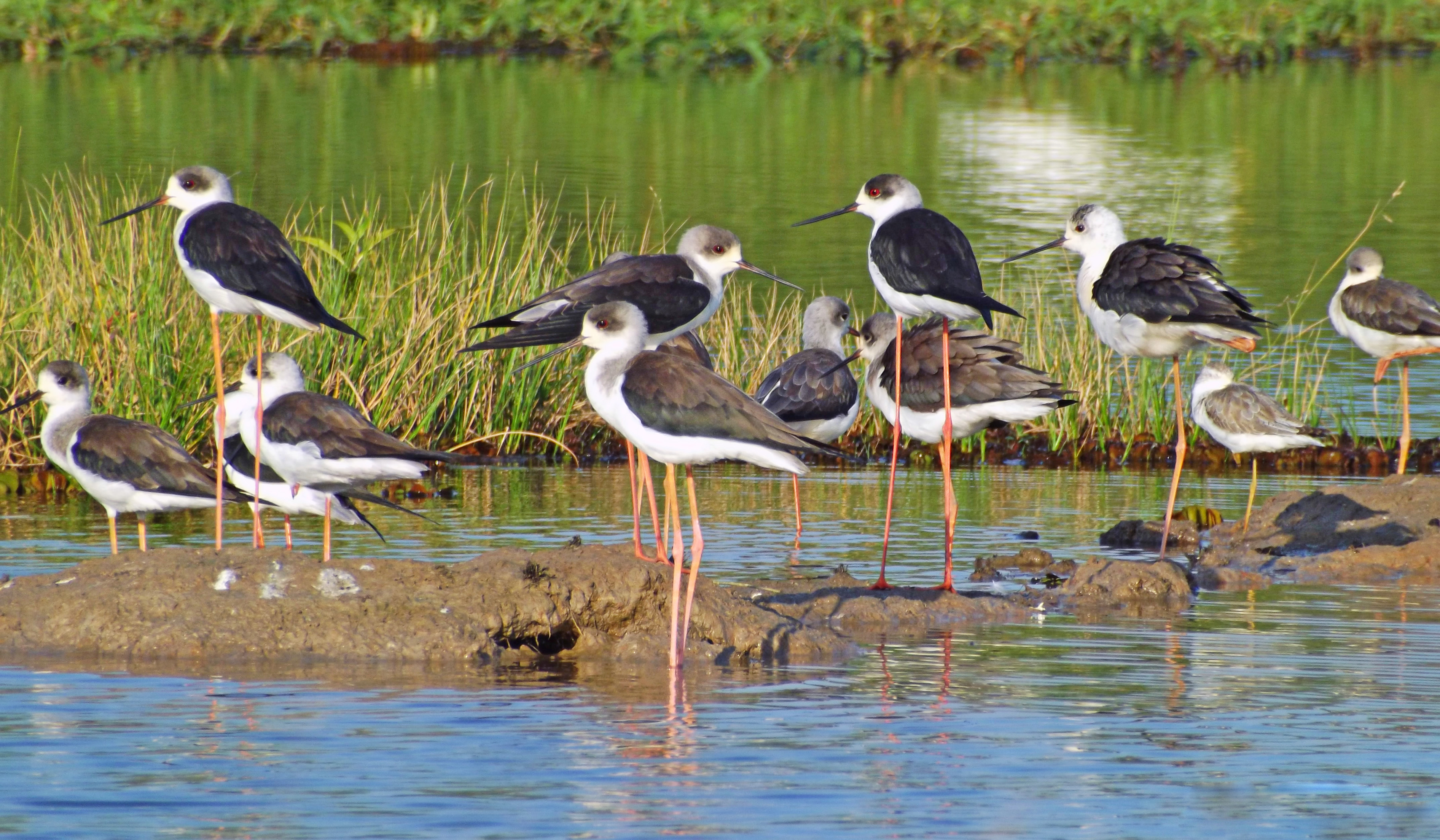 പവിഴക്കാലികൾ